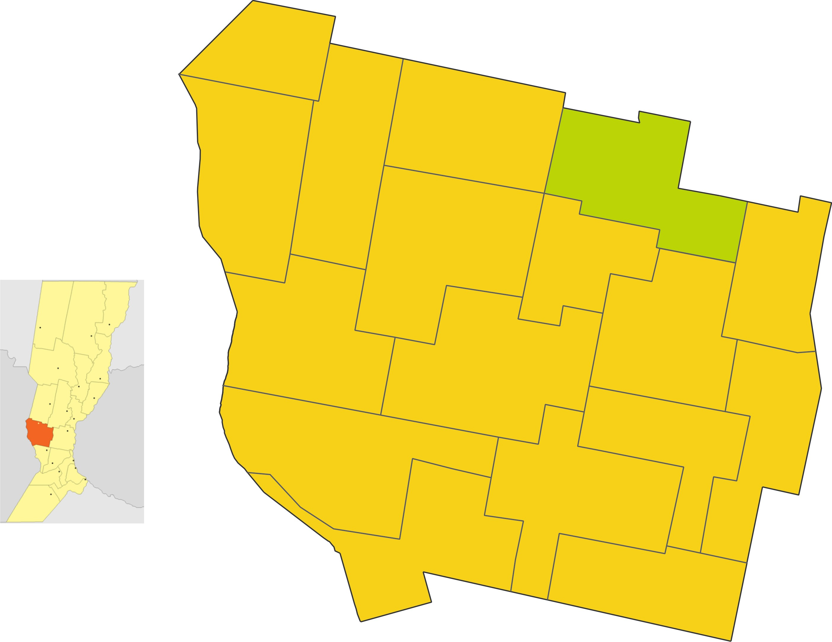 Map of the comuna de San Martin de las Escobas in San Martin department, Santa Fe province, Argentina